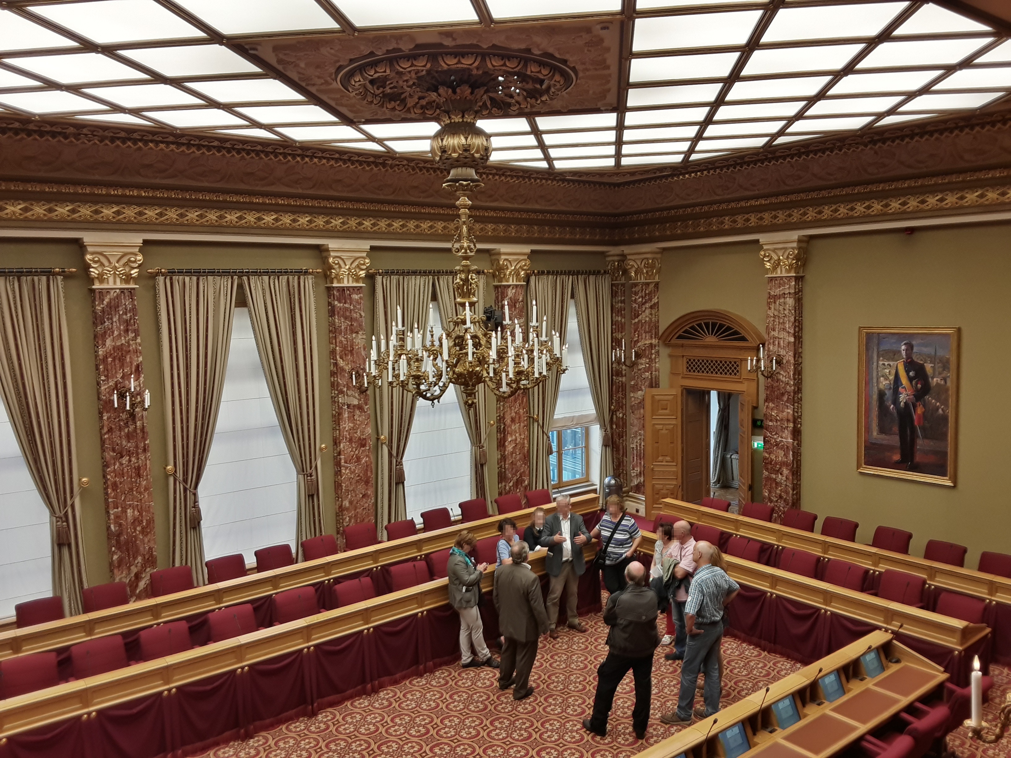 À l'intérieur de l'Hôtel de la Chambre des Députés à Luxembourg. Le Président de la Chambre des Députés (de dos, à gauche) entouré d'un groupe de visiteurs.